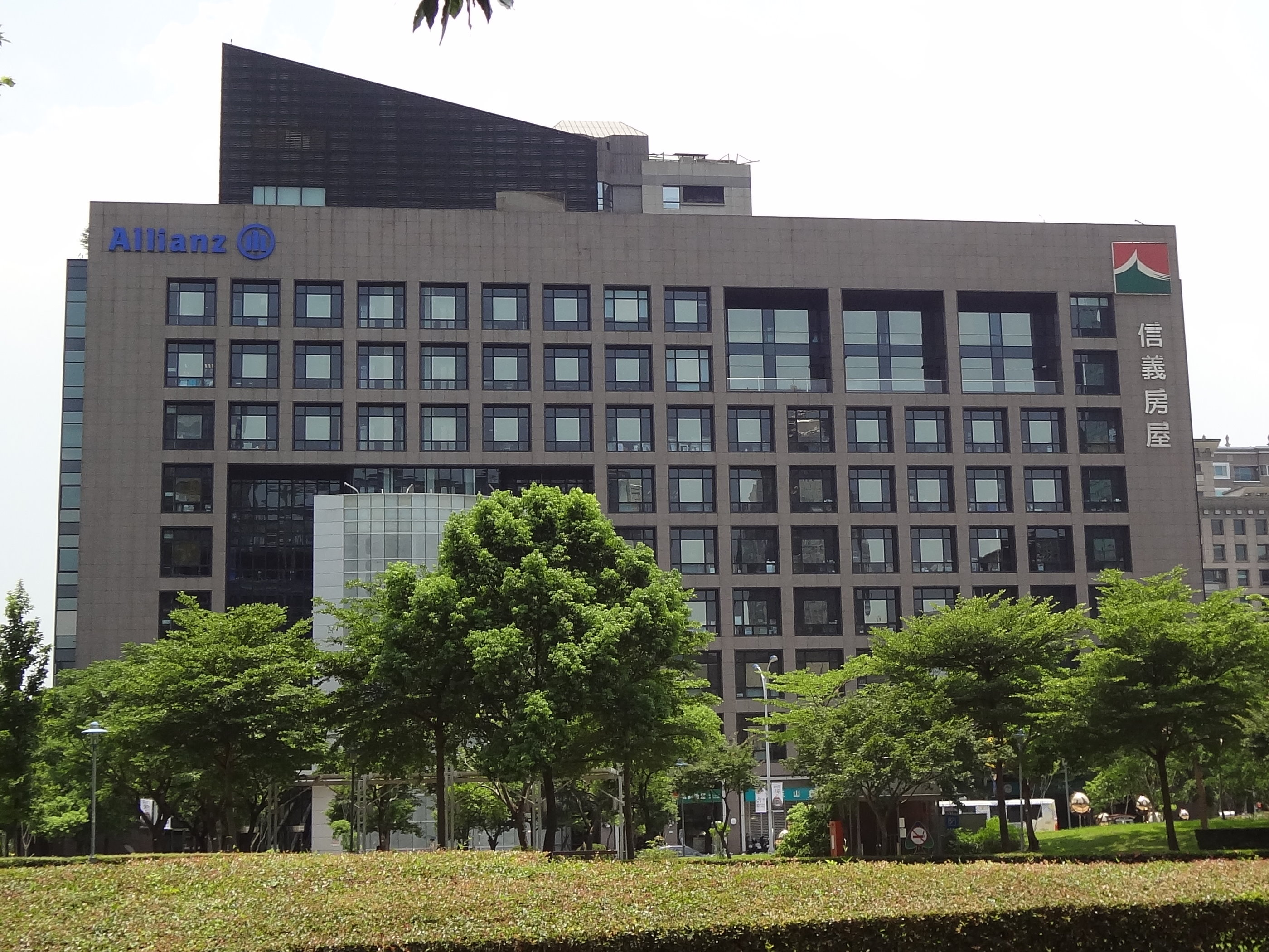 信義房屋總部，位於臺灣臺北市信義區信義路五段100號。安聯人壽臺灣營運總部位於5樓